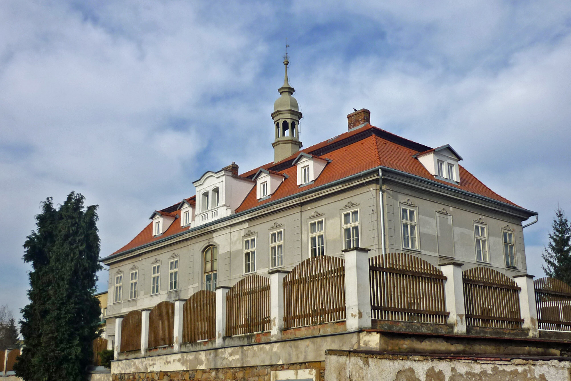 Altes Schloss in Großpriesen